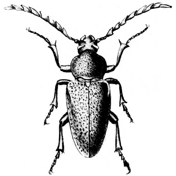 Sypilus orbignyi (Anoplodermatinae)